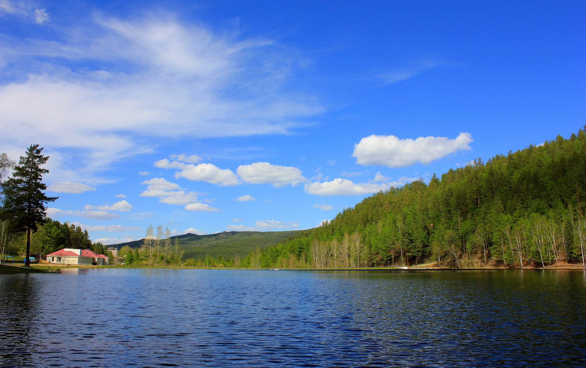 Курорт "Молоковка", Читинский район This image is related to the protected area of Russia number 7510141